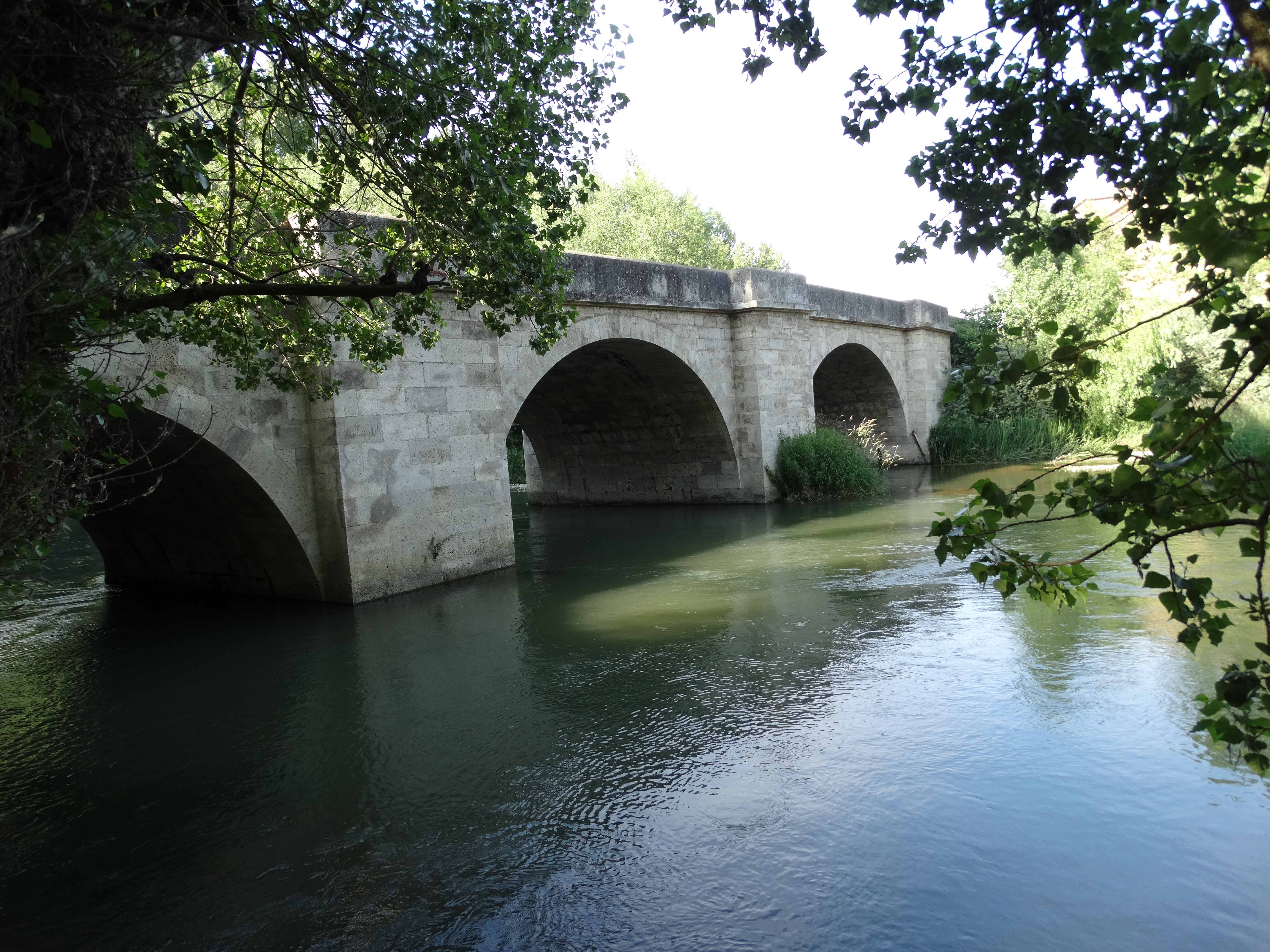 Puente sobre el río Carrión.